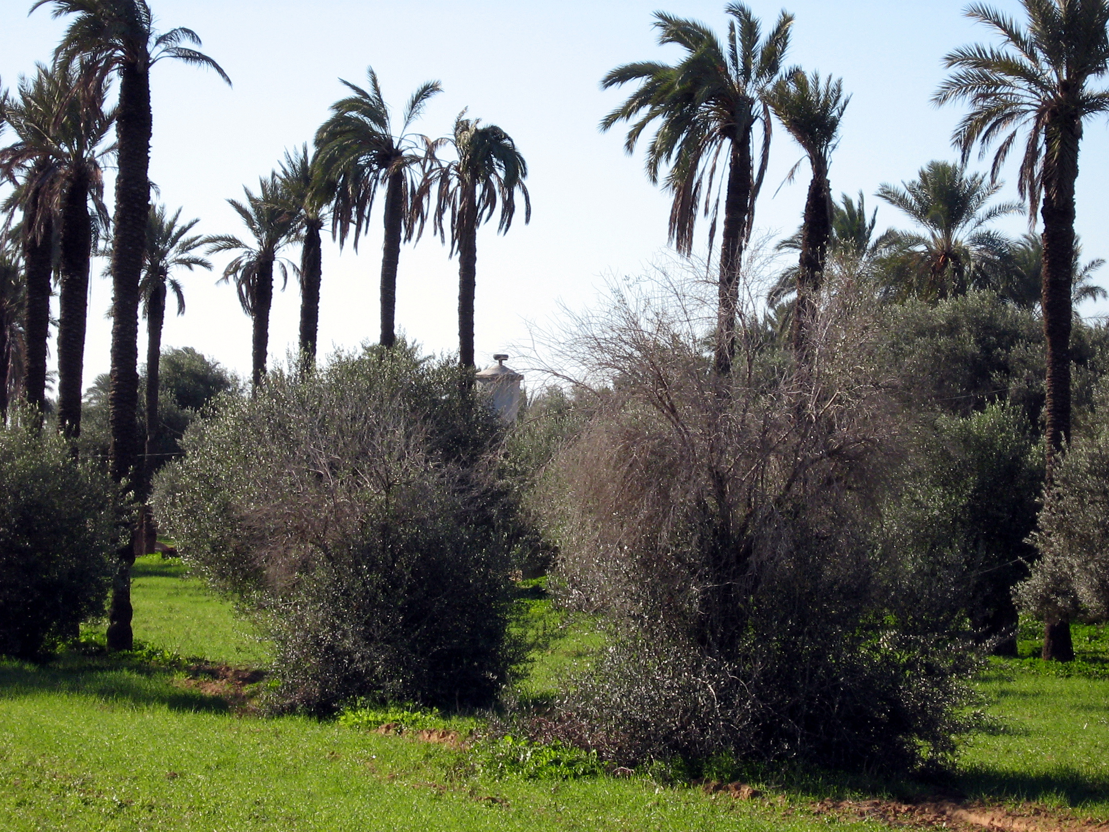 Усадьба в Бенгашире. Ливия.